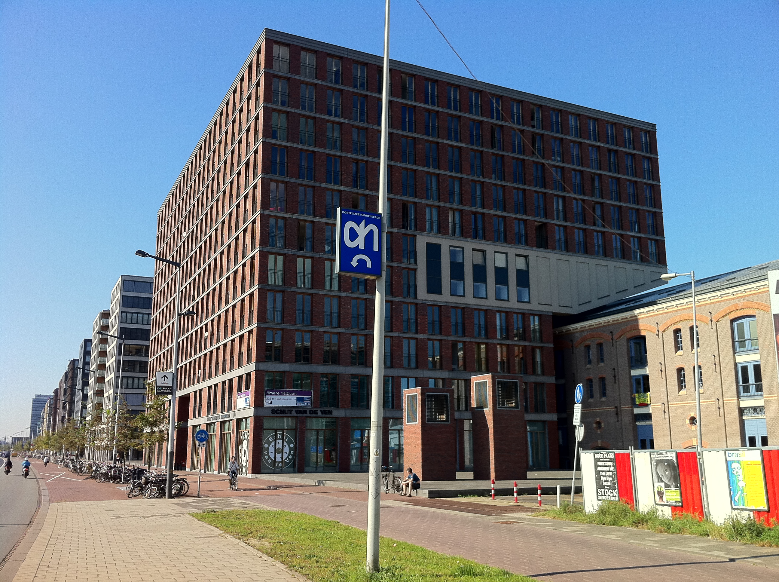 Amsterdam - Piet Heinkade Chicago